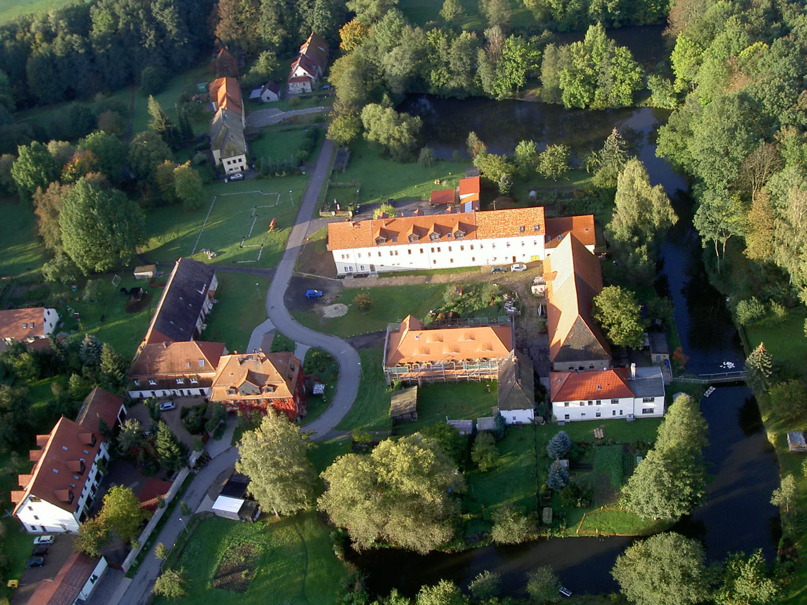 Luftbild des Rittergutes Benndorf im Jahr 2011